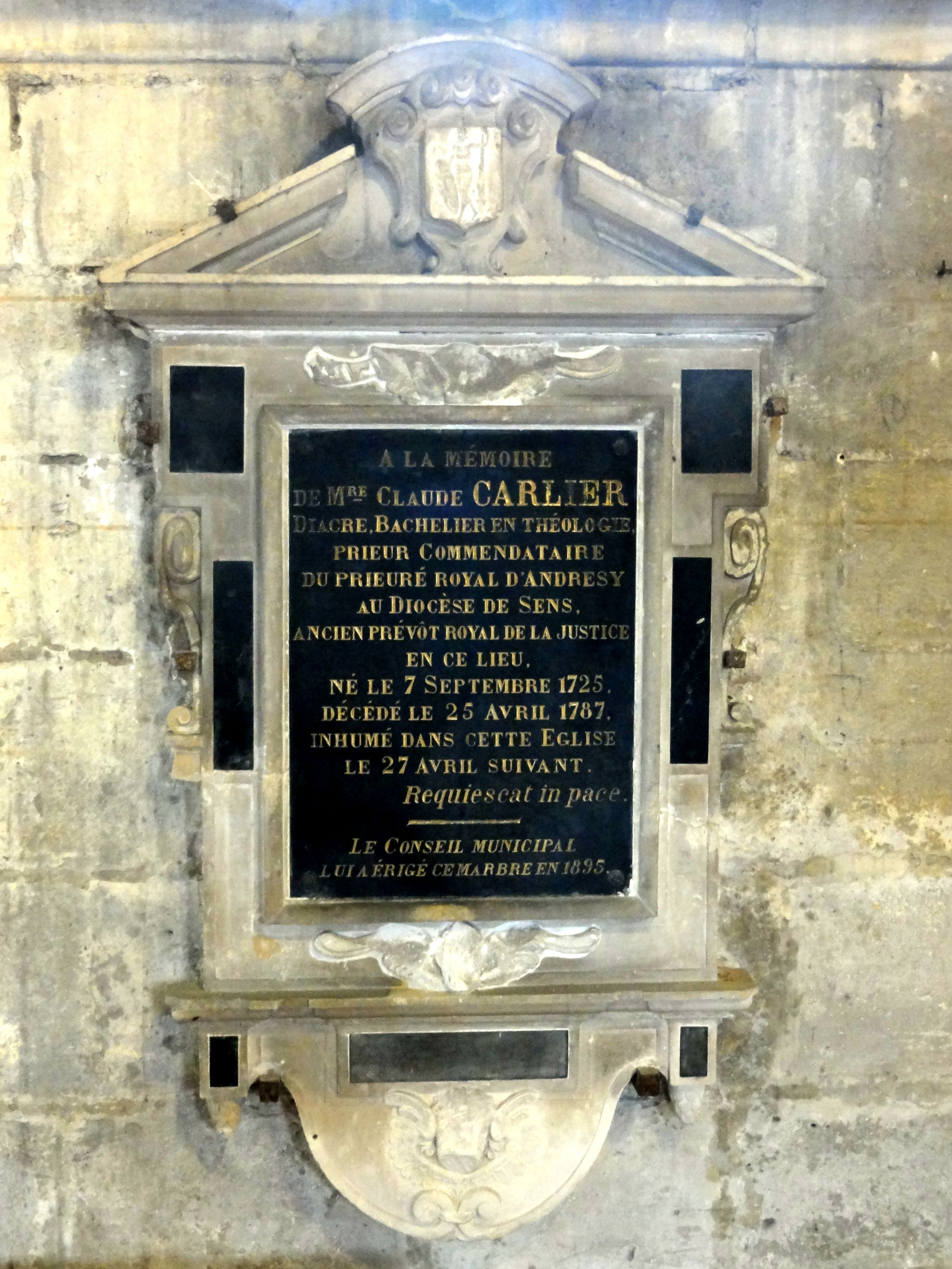 Bas-côté sud, monument pour l'abbé Claude Carlier.